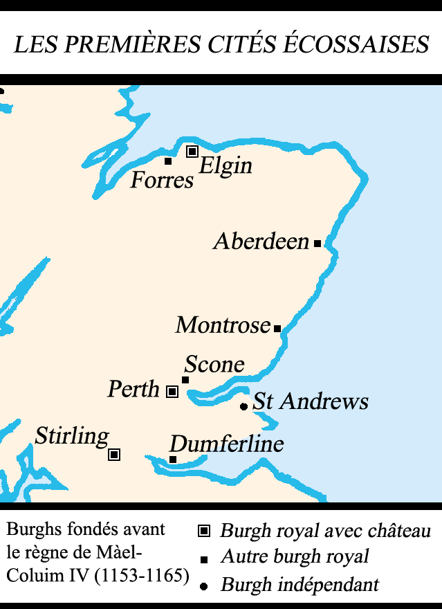 Carte des premières villes écossaises (avant 1153)